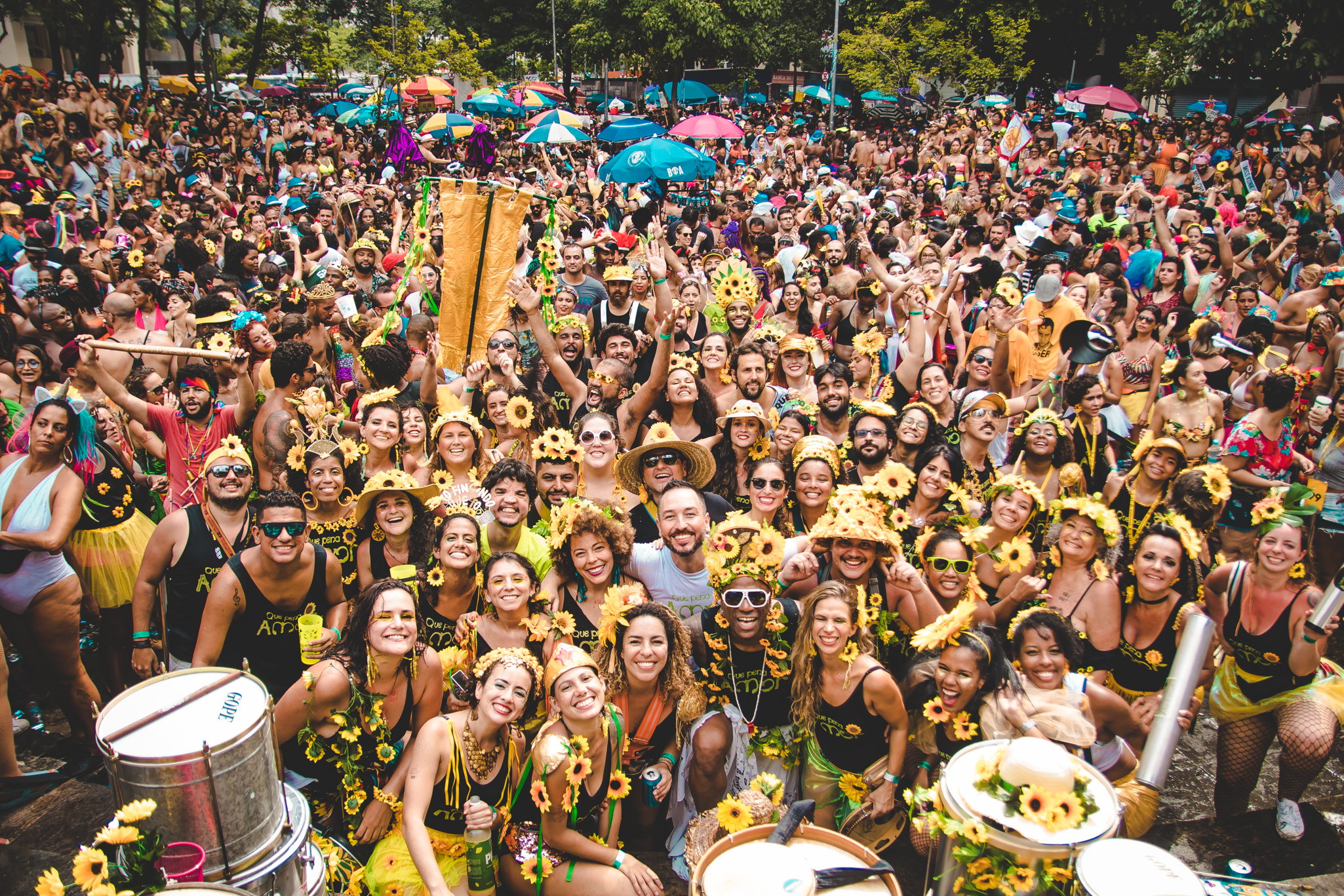 Bateria do Bloco Que Pena, amor no final do desfile de 2019